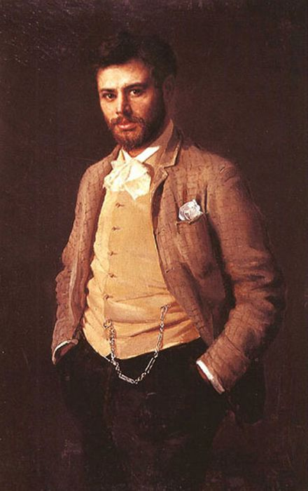 Турцевич Иосиф Григорьевич Портрет Герасима Головкова (1888, холст, масло, 108x68) Изображение поколенное, 3/4 влево. Головков одет в желтовато-серый пиджак, желтый жилет, черные брюки и белый галстук, завязанный бантом. Руки заложены в карманы брюк. в собрании ОГХМ